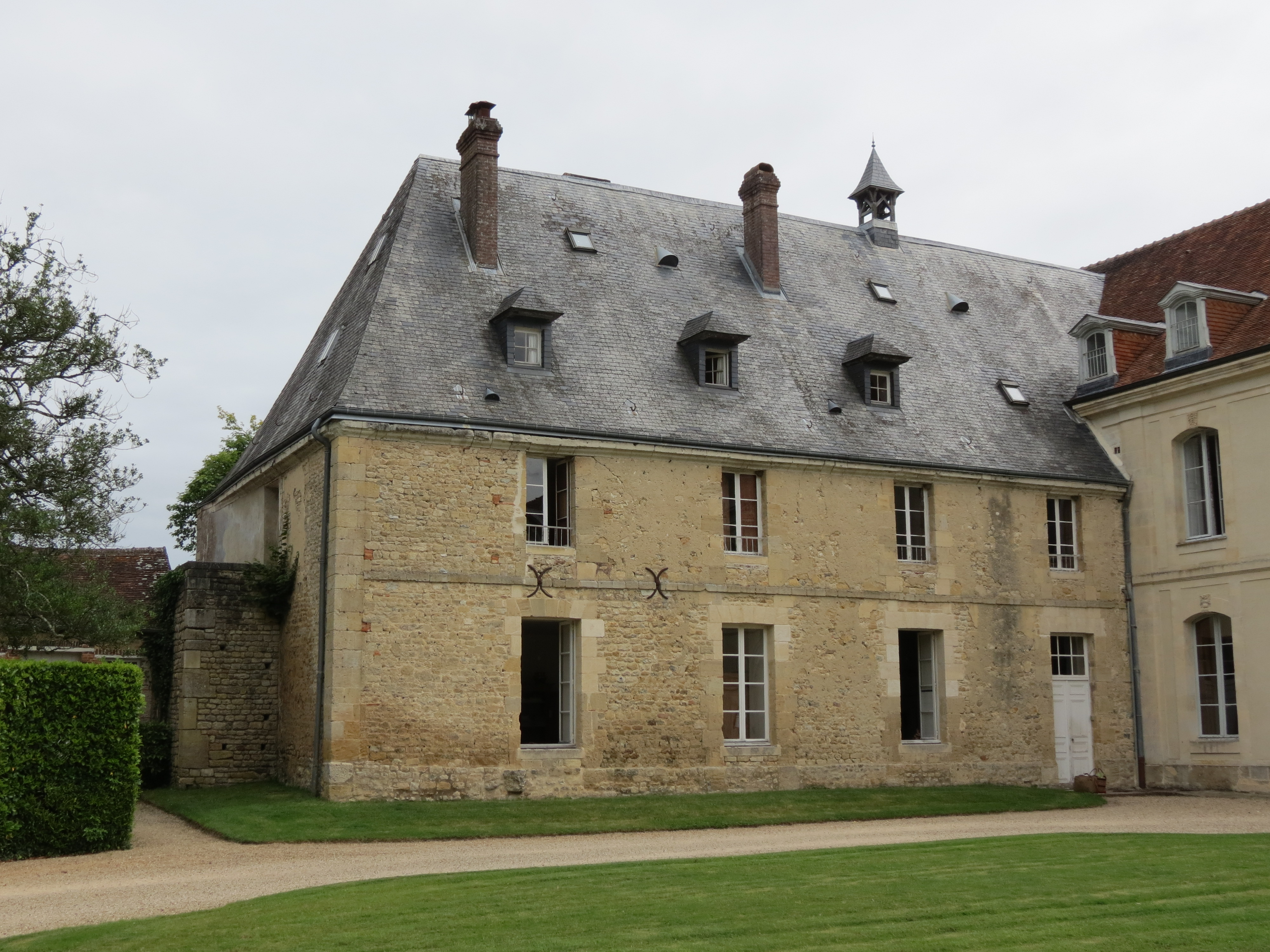 Cette aile du XVIIe est la seule des bâtiments conventuels conservée de l'abbaye du Val-Richer.